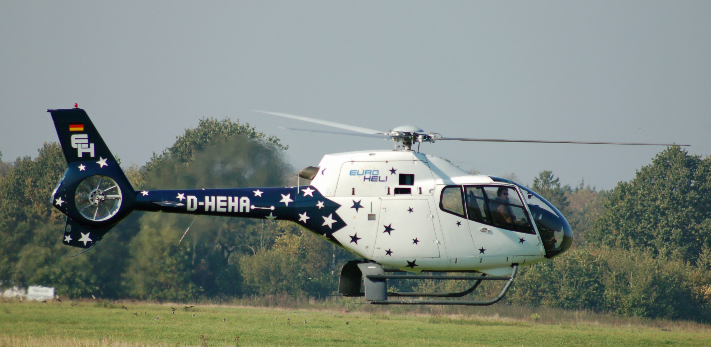 Eurocopter EC-120B Colibri (D-HEHA) über dem Flugplatz Uetersen